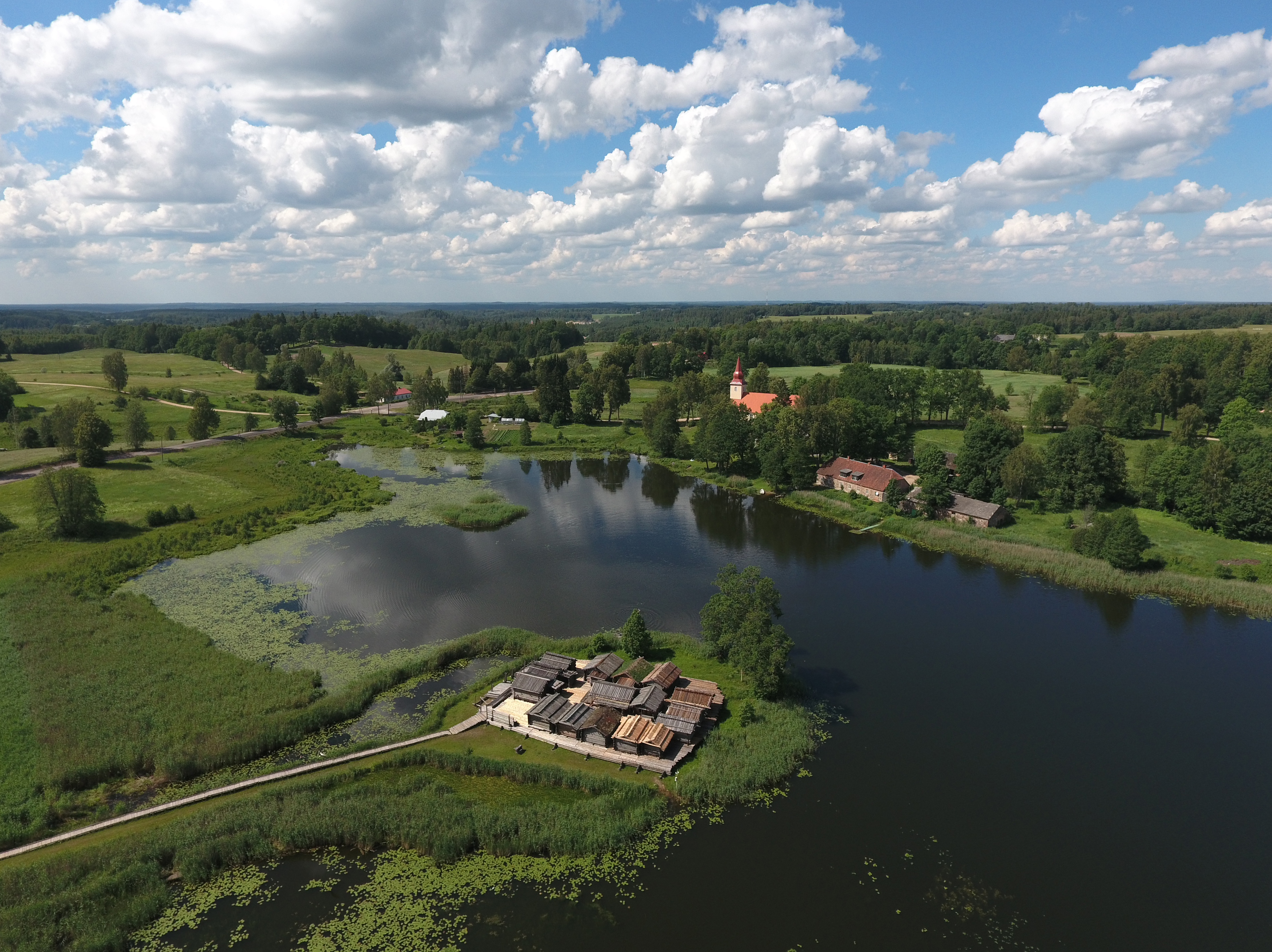 Āraišu ezerpils, Drabešu pagasts